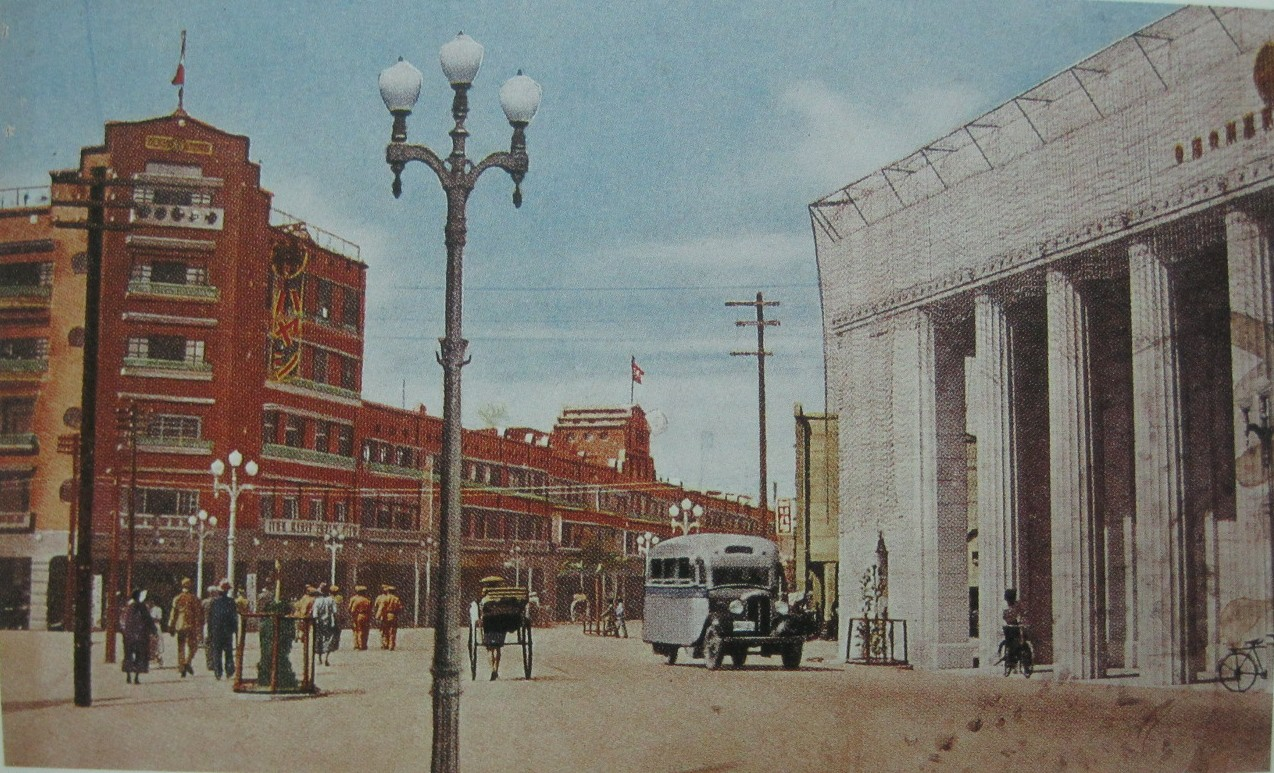 臺南末廣町，圖左是林百貨，圖右是日本勸業銀行臺南支店。